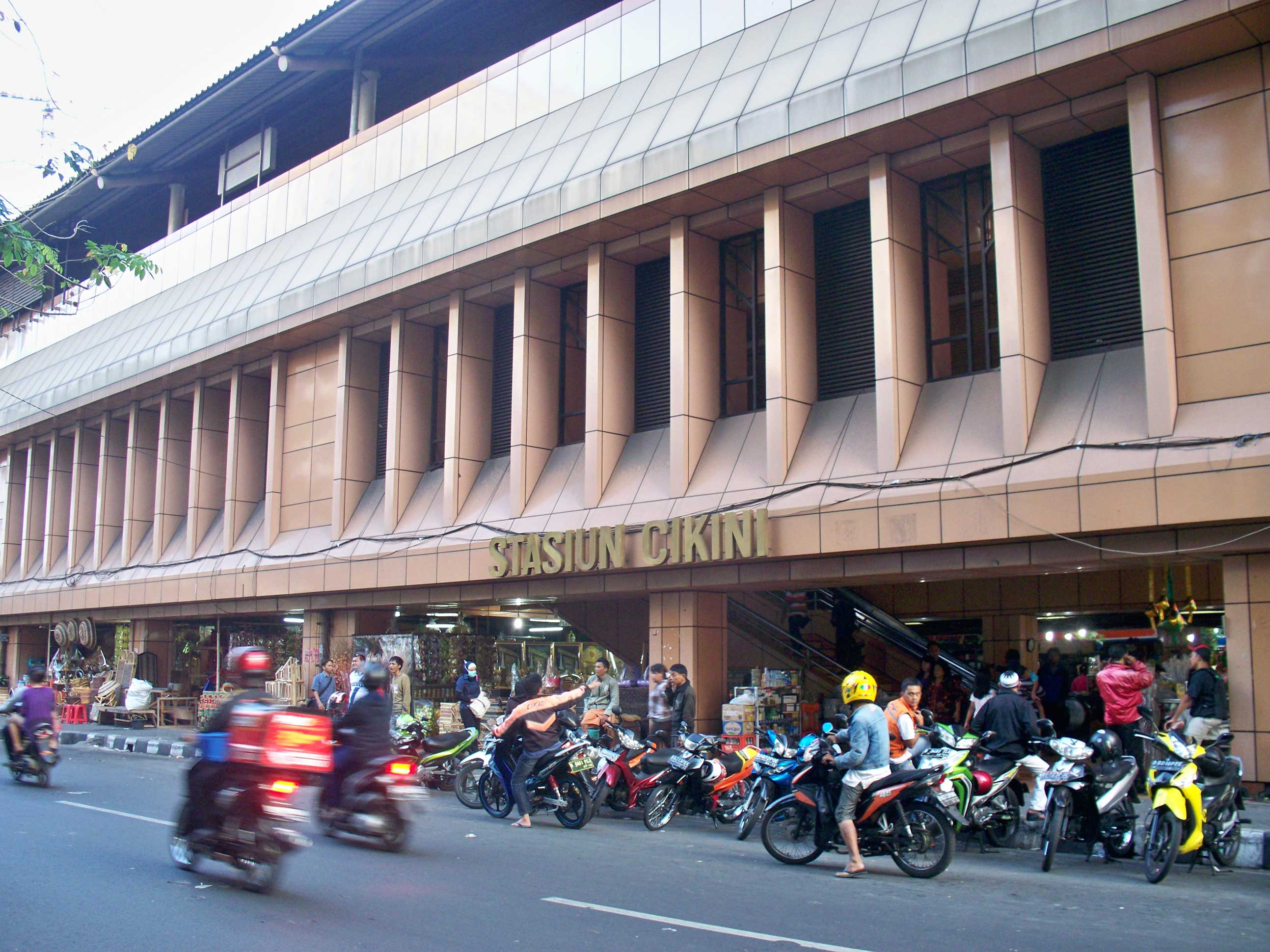 Stasiun Cikini